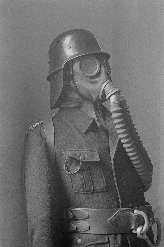 Original image description from the Deutsche FotothekEinsatzuniform der Feuerwehr mit Atemschutzmaske